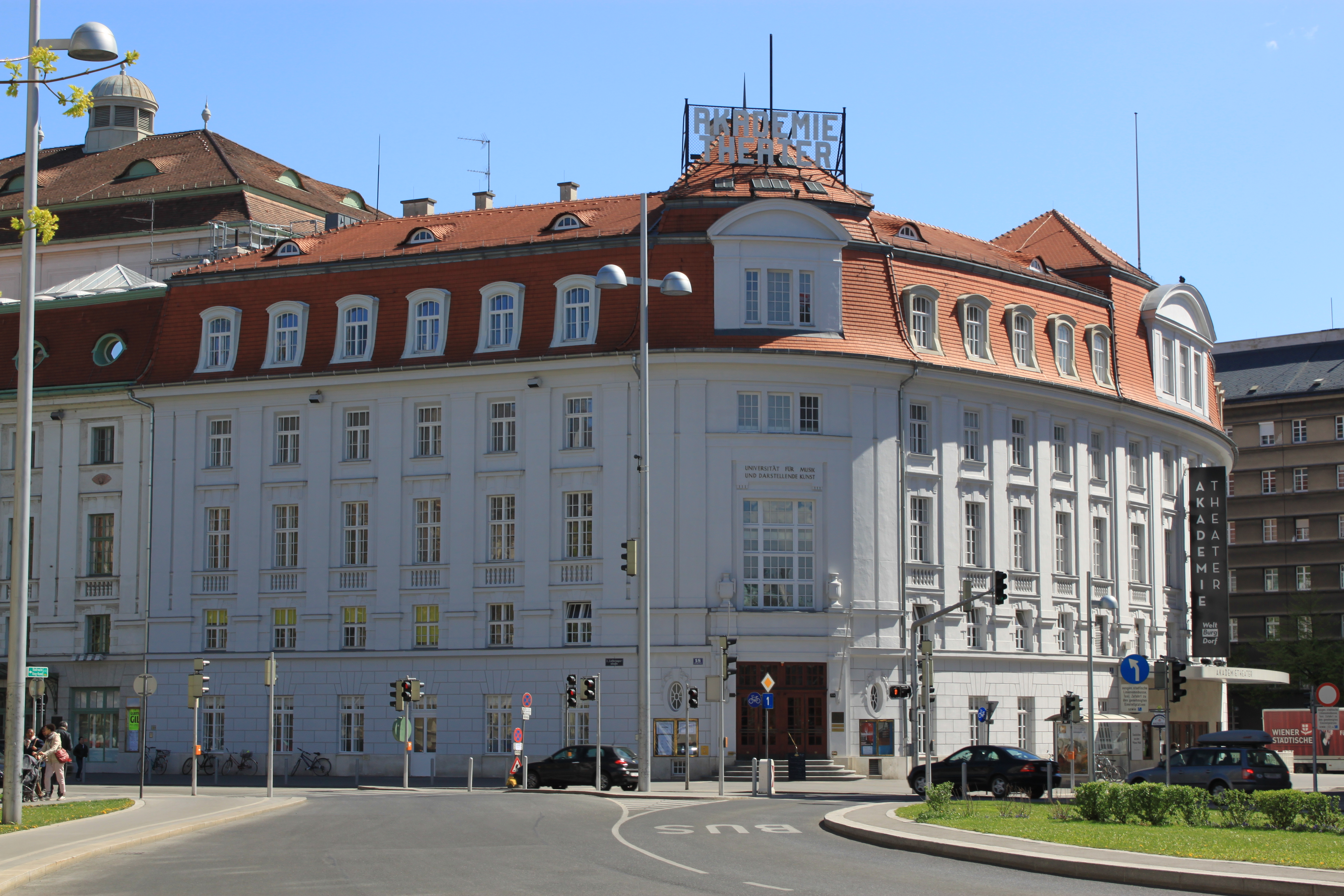 Institutsgebäude und ehem. Hauptgebäude der Universität für Musik und darstellende Kunst Wien samt Akademietheater, Lothringerstraße 18